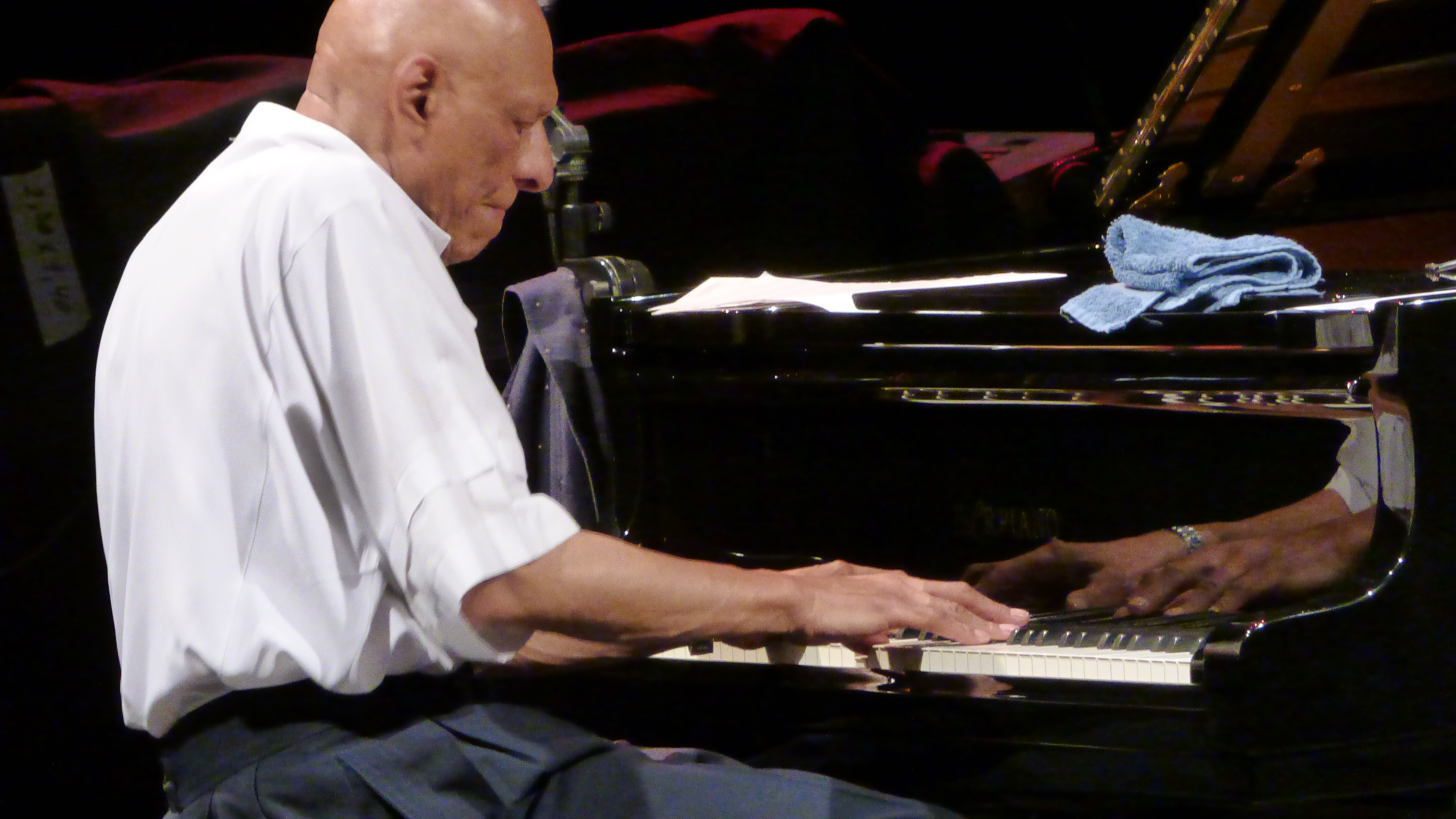 Concierto de KIRK LIGHTSEY – ANTONIO SERRANO, en Festival Internacional de Jazz de San Javier 2016